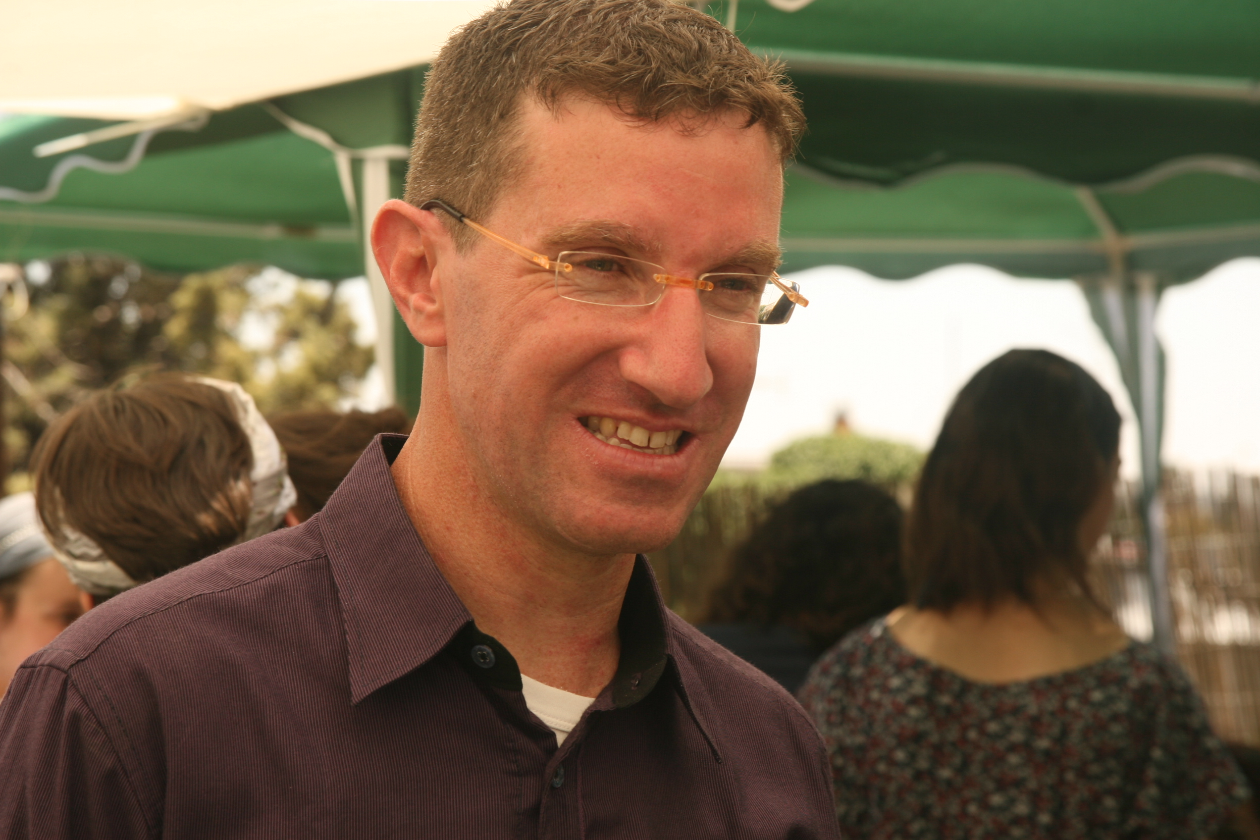 דוד שפרבר הוא אוצר, חוקר ומבקר אמנות, בעיקר יהודית וישראלית.